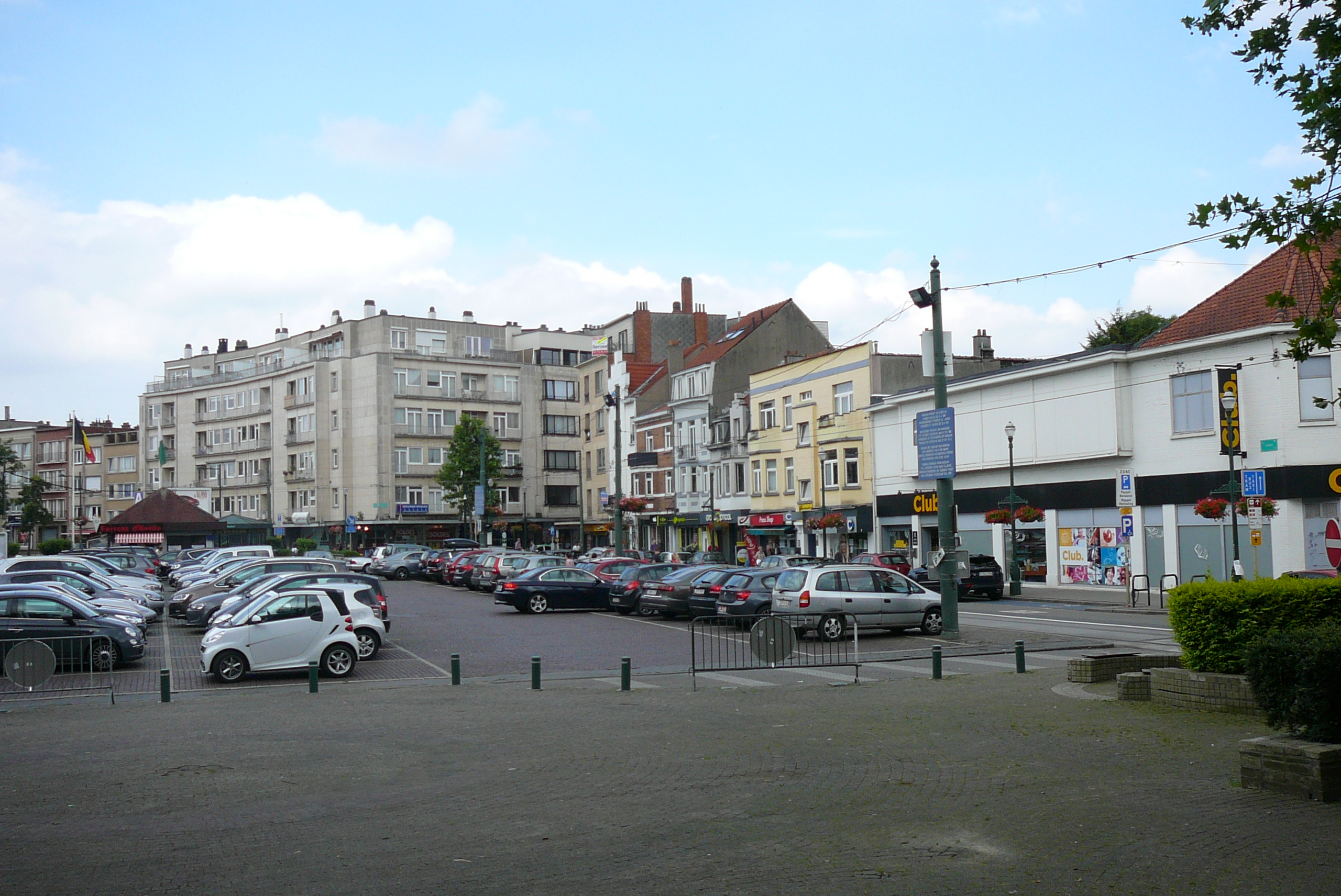 Place Dumon à Woluwe-Saint-Pierre, en Région bruxelloise, Belgique, en juillet 2016